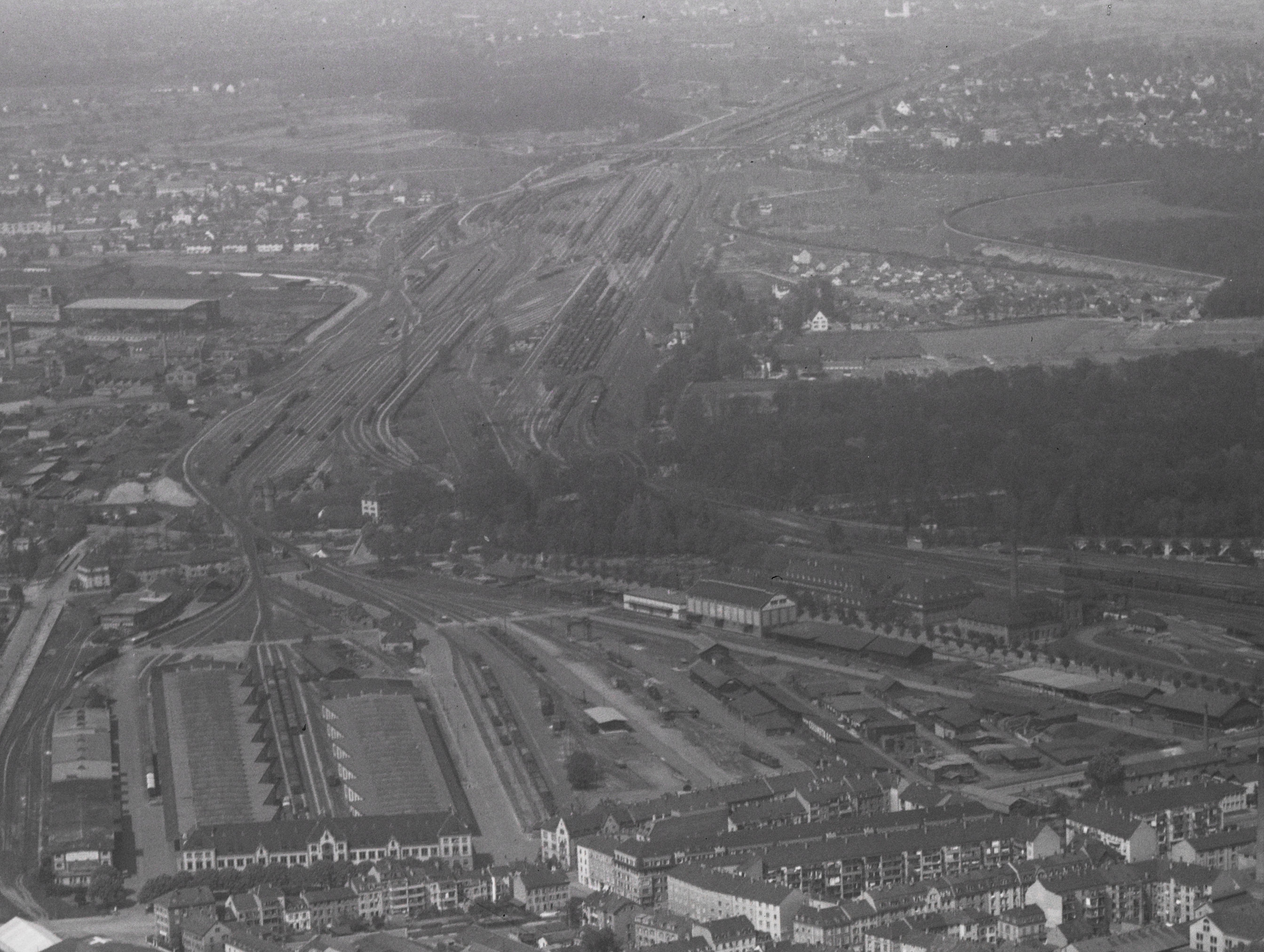 Basel, Mustermesse, MUBABildausschnitt: Badischer Güterbahnhof (vorne), Badischer Rangierbahnhof (oben), Einfahrt zum Badischen Bahnhof (rechts), Kehrschleife (darüber)